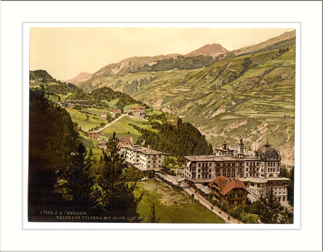 Lower Engadine Vulpera and Fetan Grisons Switzerland Grand Hotel Waldhaus Vulpera